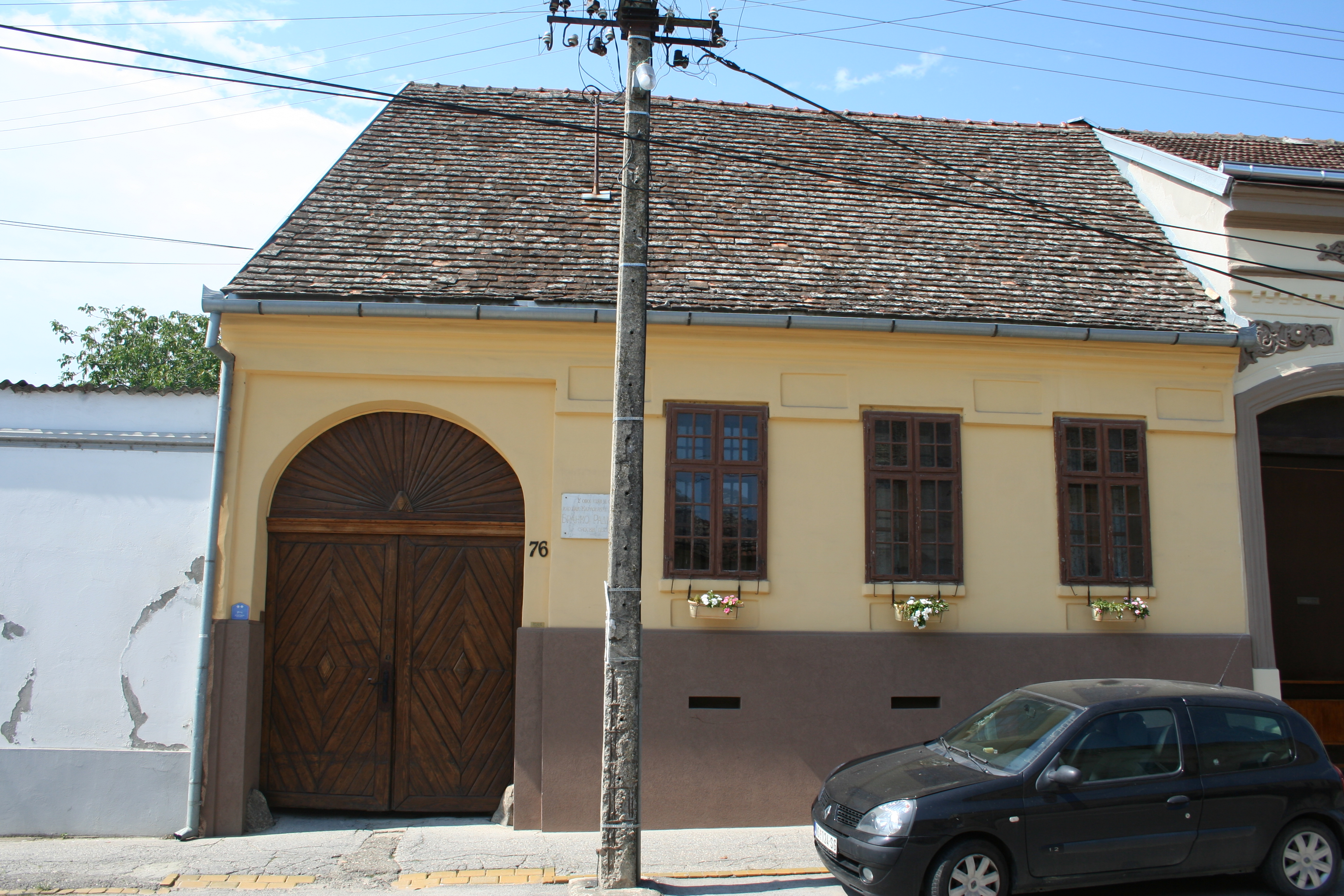 Kuća u kojoj je stanovao Branko Radičević